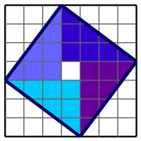 Une démonstration archaïque du théorème de Pythagore